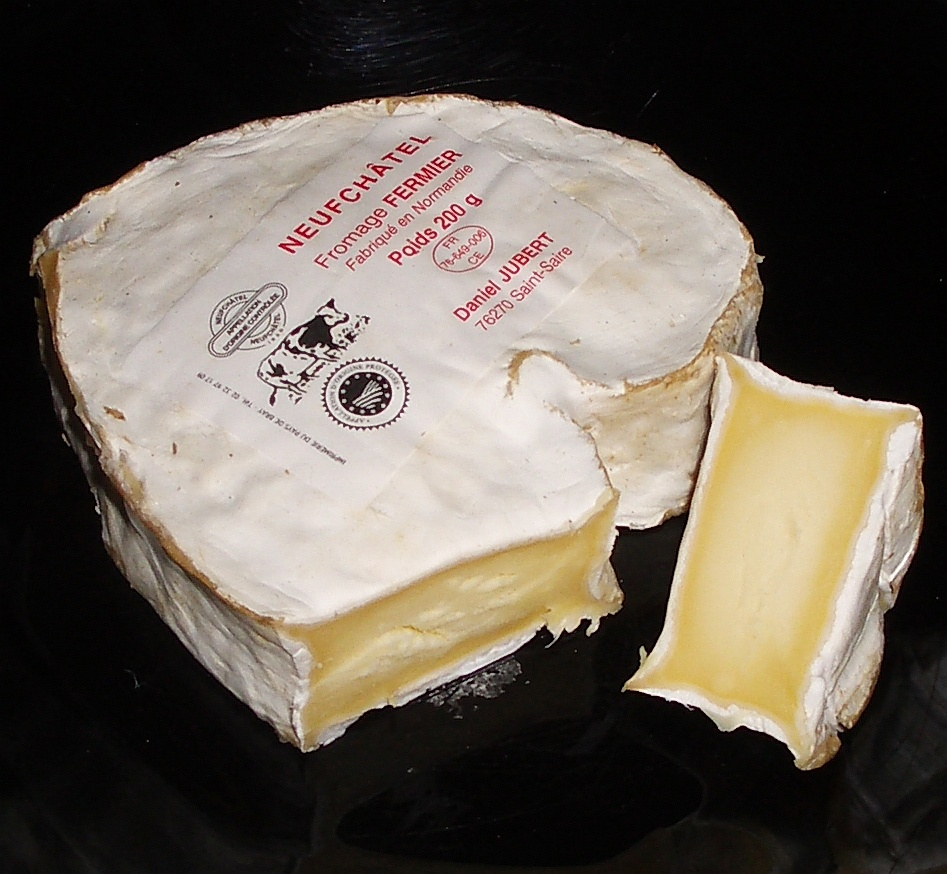 Un cœur de Neufchâtel fermier